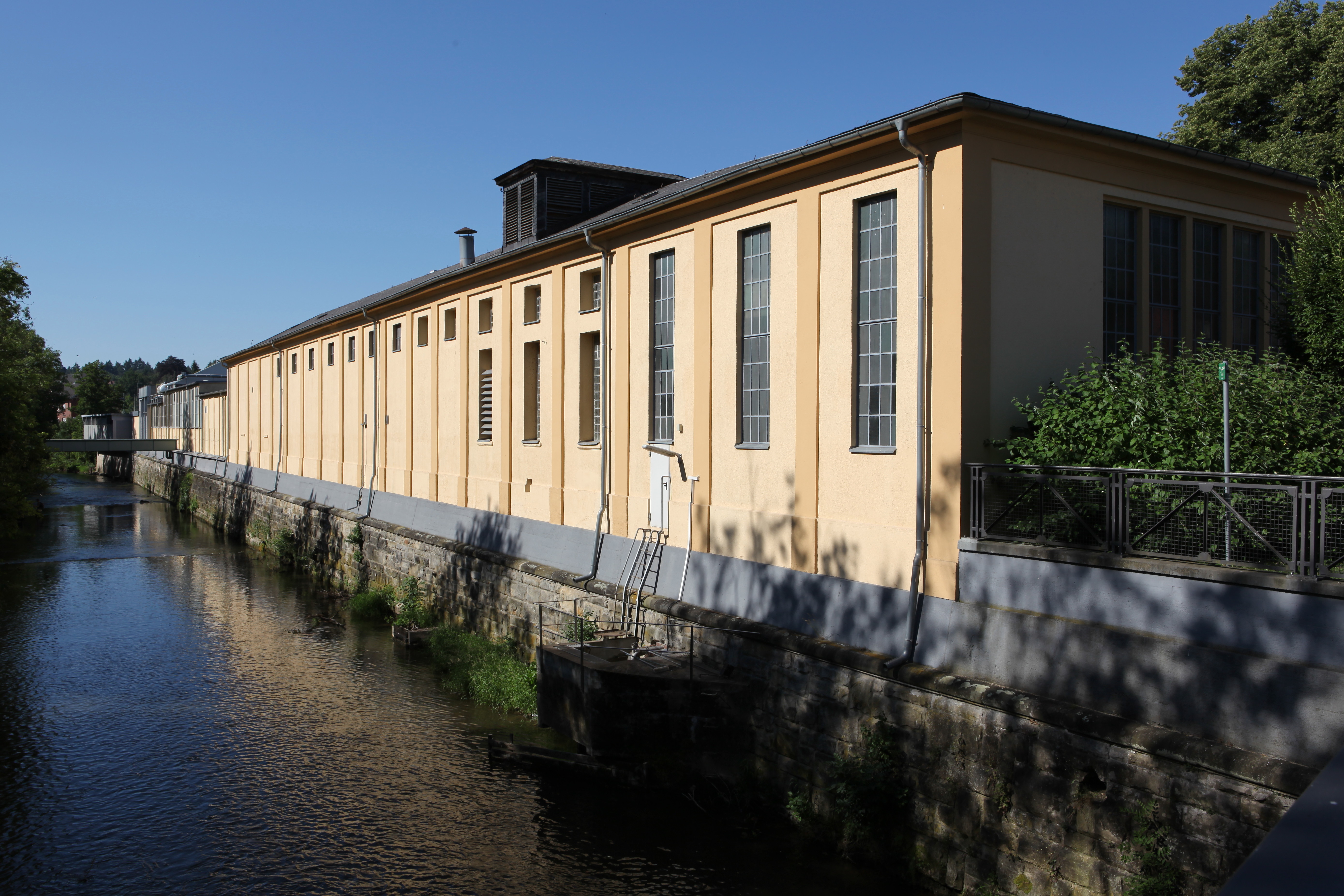 Schlachthof Coburg, Fronat an der Itz